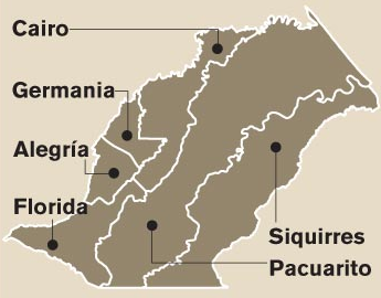 Mapa de los distritos del cantón de Siquirres, provincia de Limón, Costa Rica.